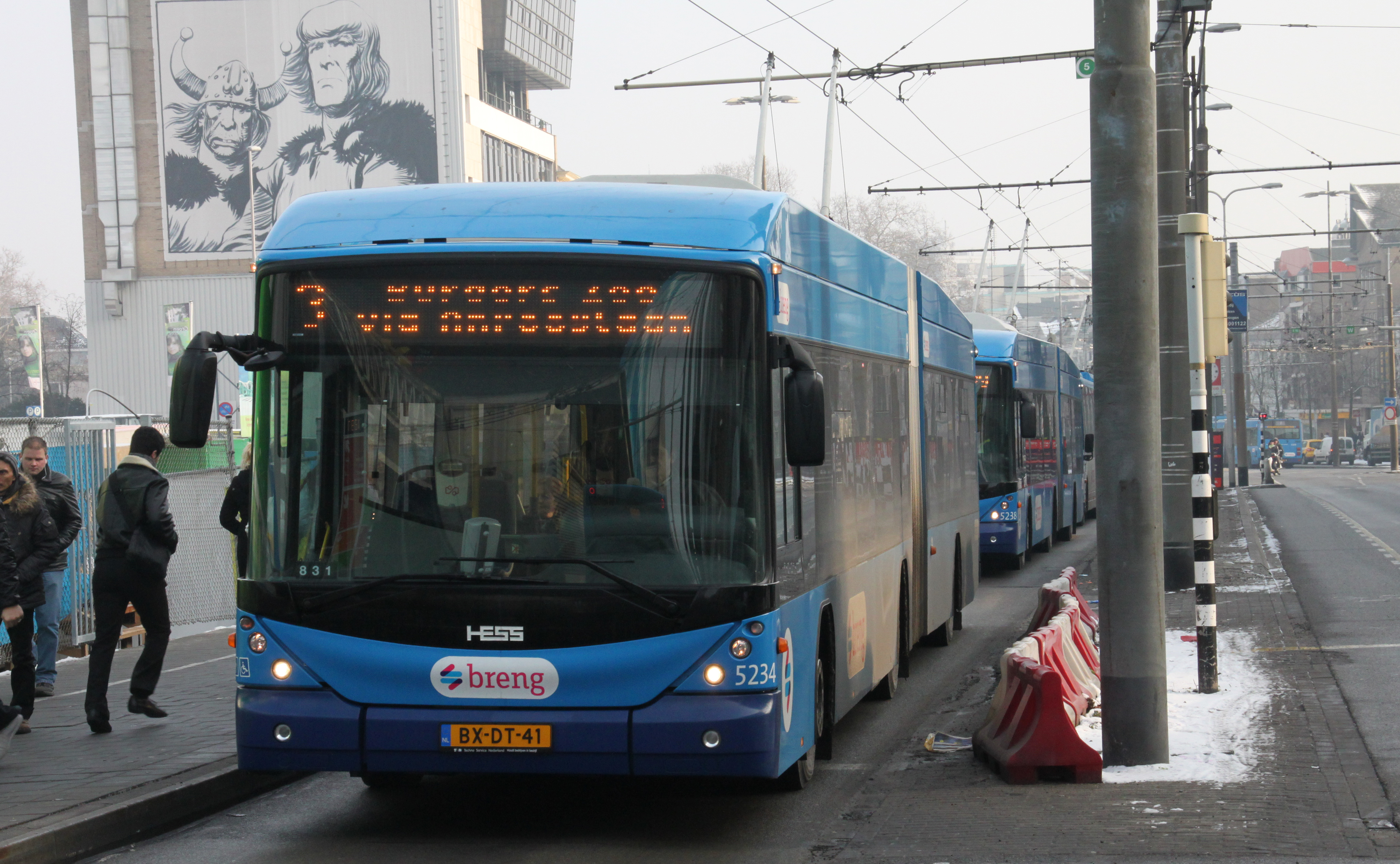 Een Hess Swisstrolley in Arnhem. Voor de concessie Breng/Stadsregio Arnhem-Nijmegen zijn 9 van deze bussen besteld.